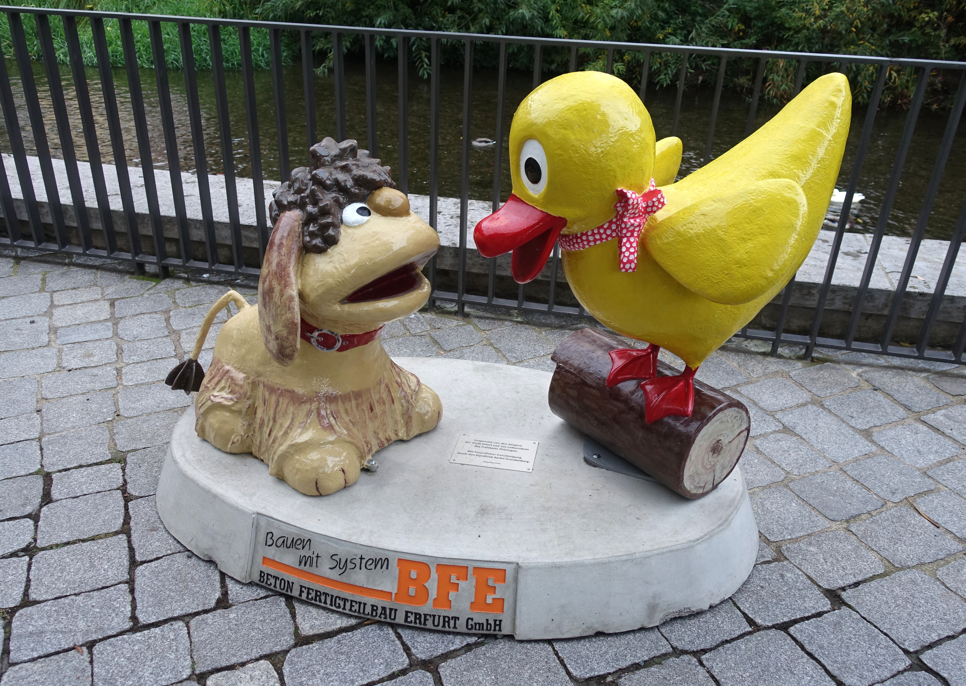 Die KiKa-Figuren von Moppi und Schnatterinchen hinter der Krämerbrücke in Erfurt